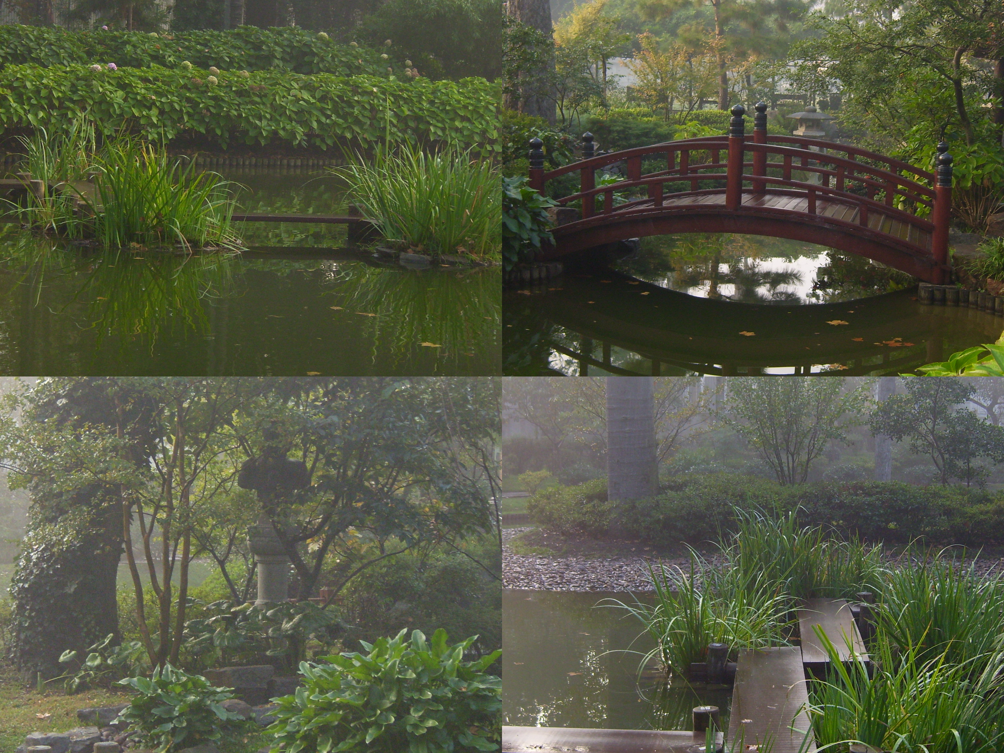 Linterna de piedra, Zig Zag bashi, Taikobashi, del Jardin Japonés Hei Sei En, Montevideo